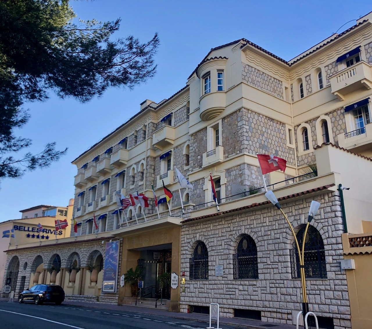 L'entrée de l'Hôtel Belles Rives au mois de décembre 2019.